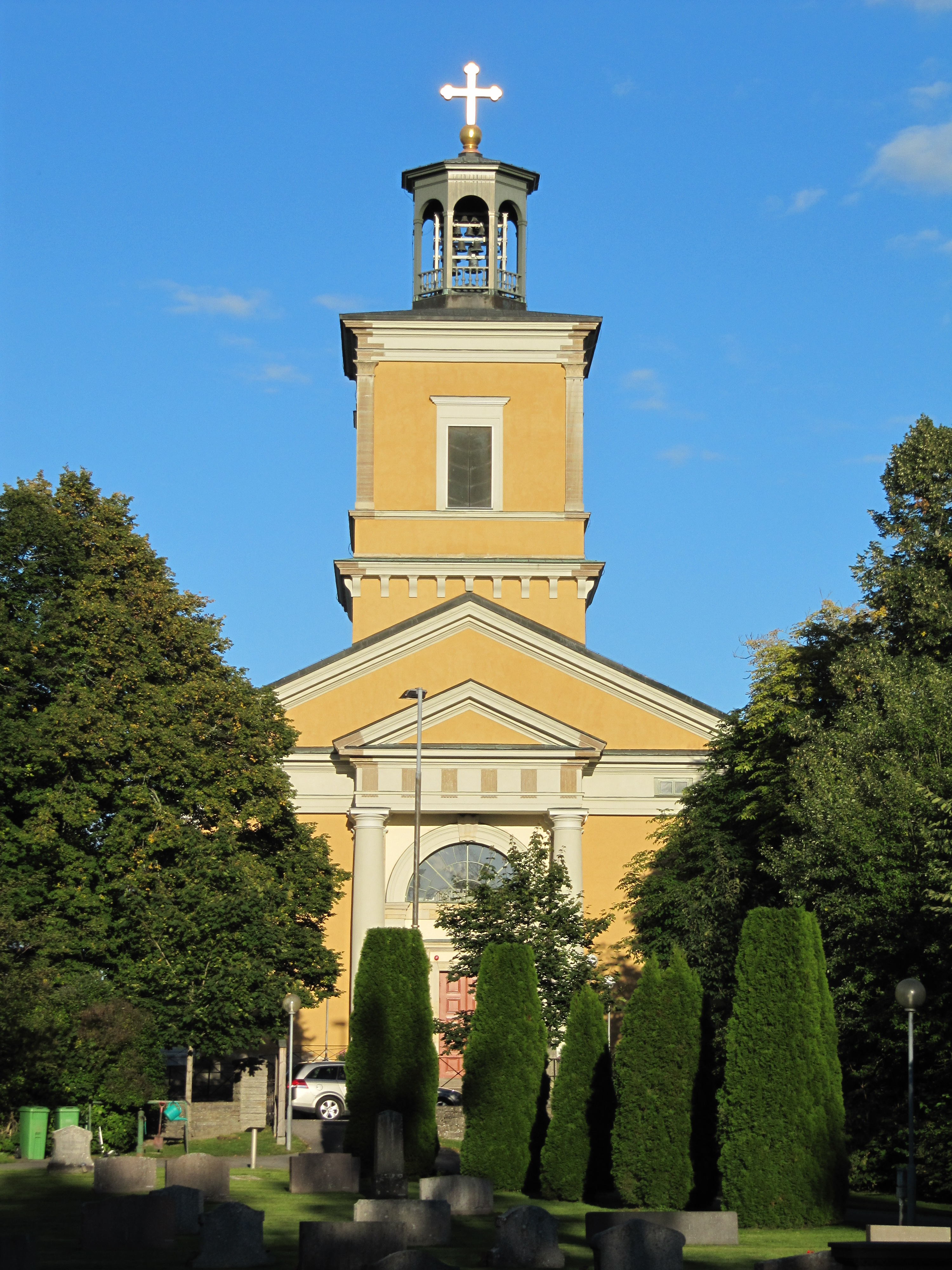 Kumla kyrka